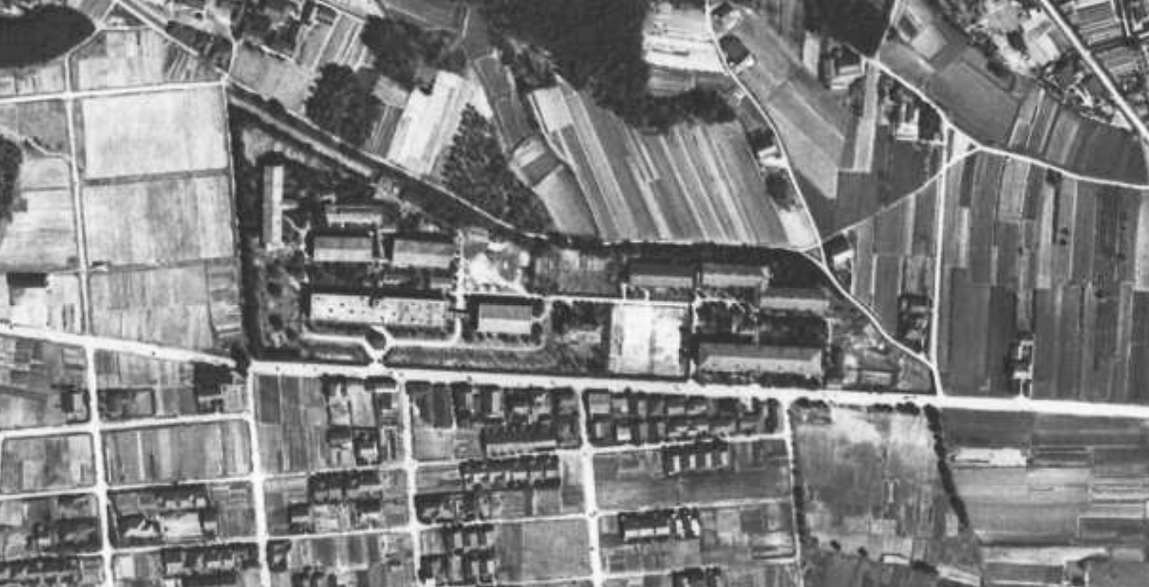 大阪女子医学専門学校のキャンパス。後の関西医科大学。当時は大阪女子医科大学予科。2018年現在も残る本館と講堂が写っている他、平成10年頃まで残っていた解剖実習室も見える